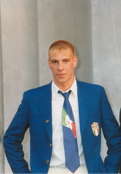 Emiliano Brembilla il 29.07.96 al rientro dalle Olimpiadi di Atlanta.